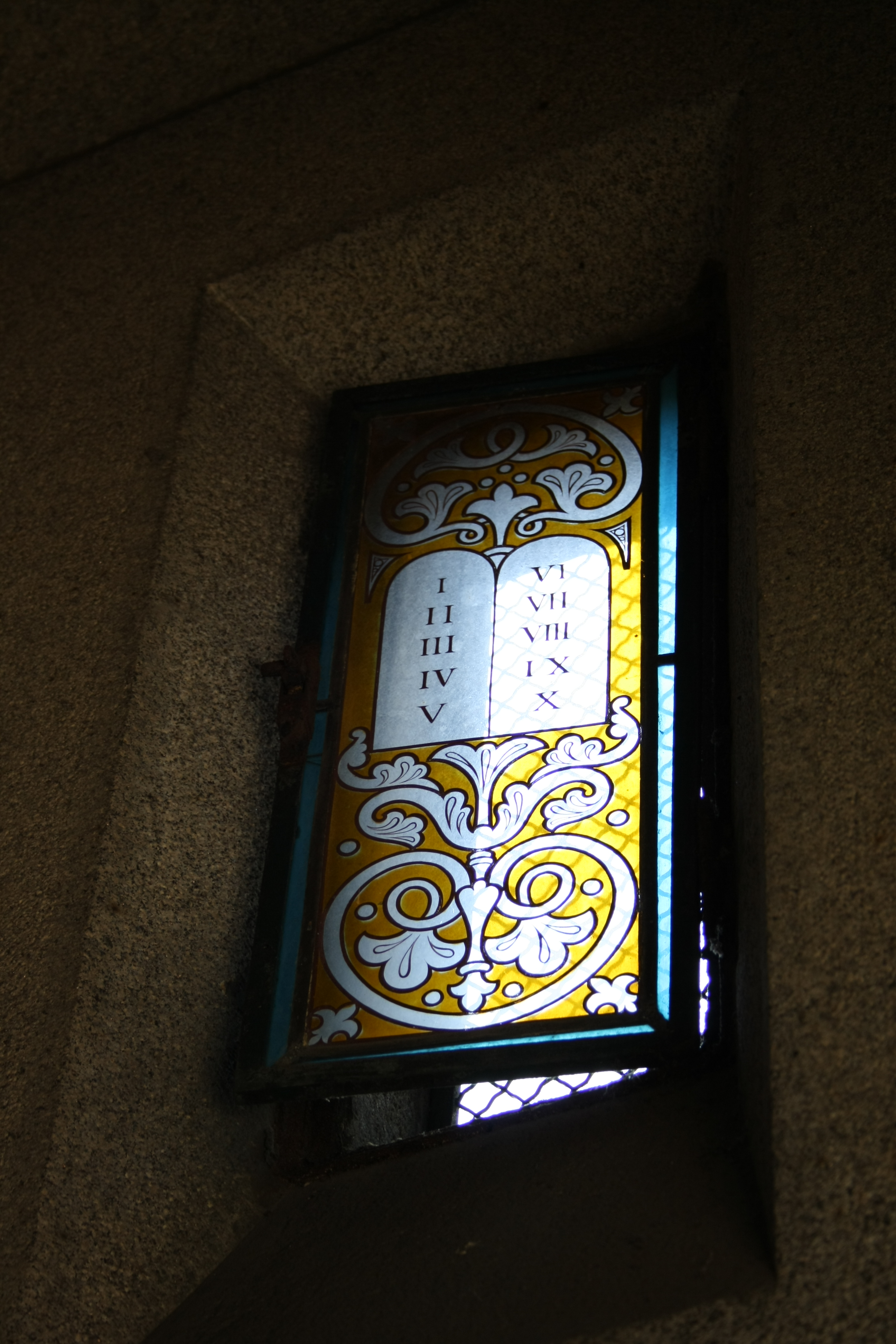 Bleiglasfenster auf dem Friedhof Montparnasse in Paris, Darstellung: Zehn Gebote